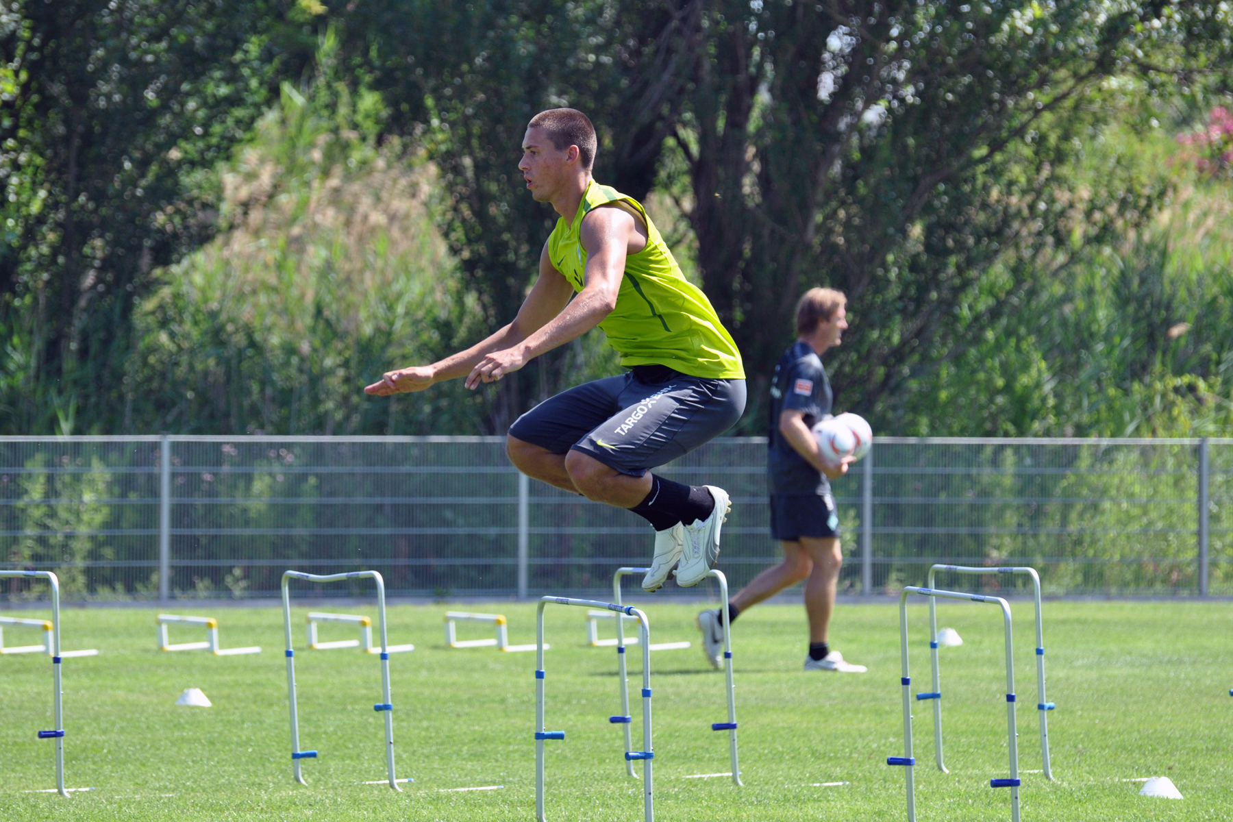 Sandro Wagner